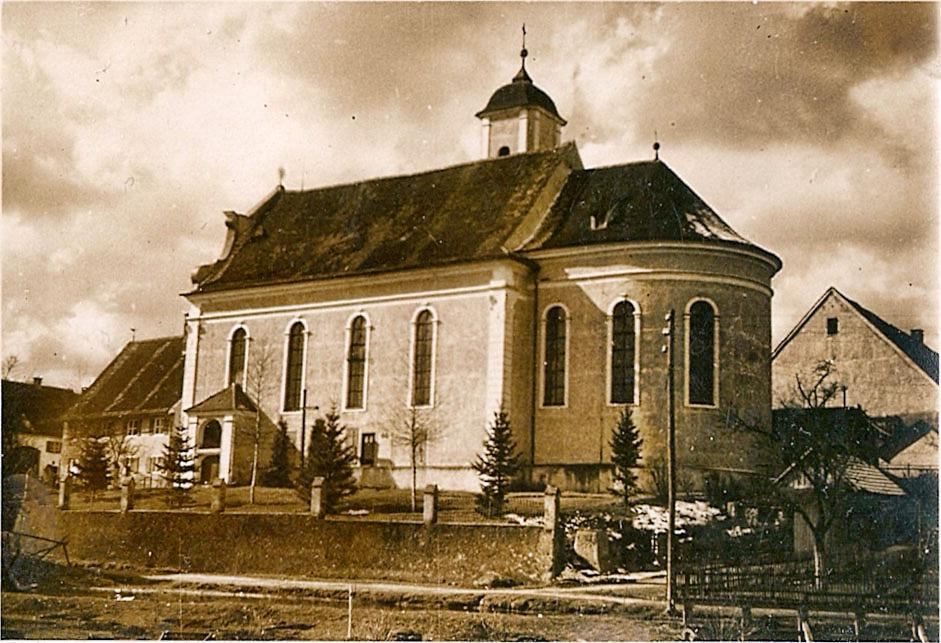 Ansicht von Osten, St. Ulrich Amendingen